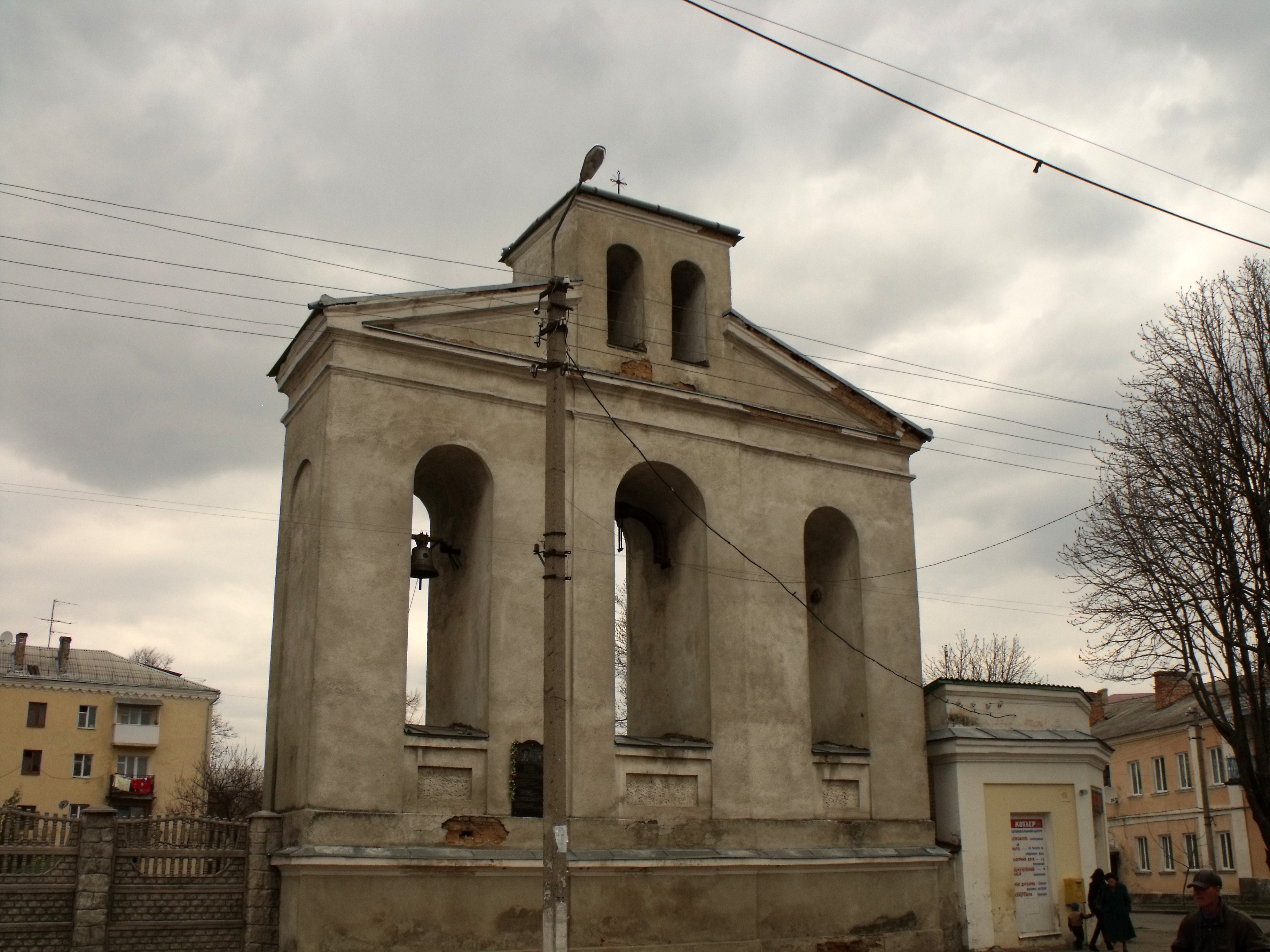 Парафіяльний костел (мур.): Дубно, вул.Острозького, 18